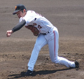 Giants_miyamoto_012